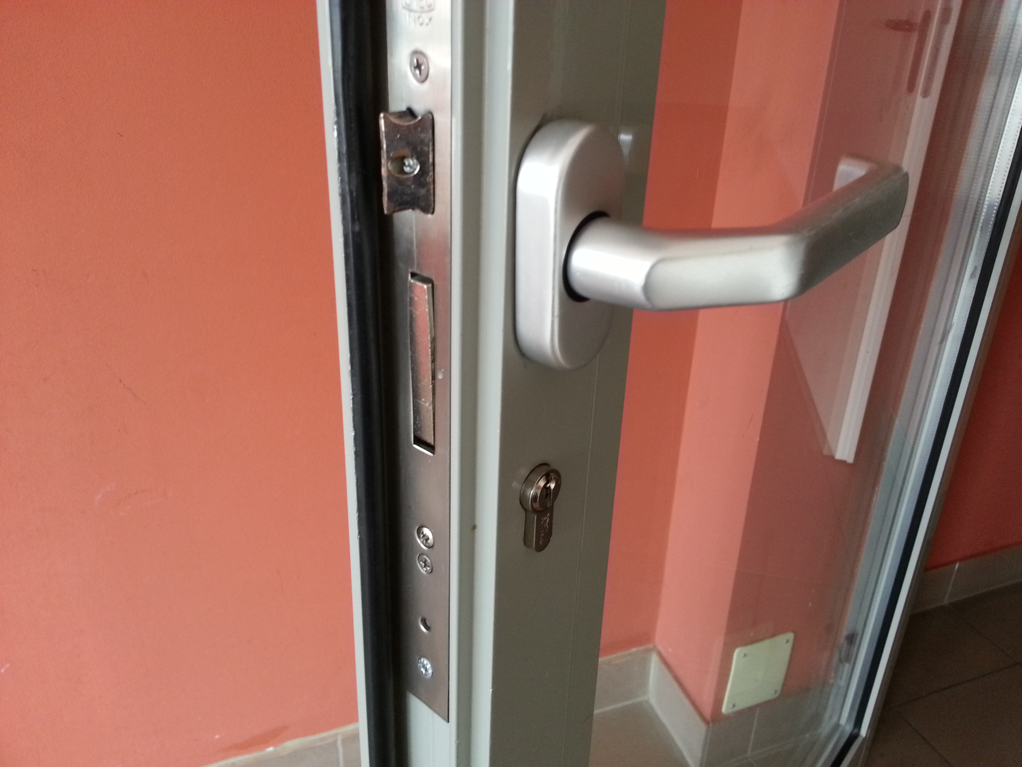 Vhodna ključavnica v večstanovanjskem objektu je del zapornega sistema centralne ključavnice. Vsi stanovalci s svojim ključem ta vrata,čeprav ne morejo odkleniti z istim ključem tudi vrata drugih stanovanj.